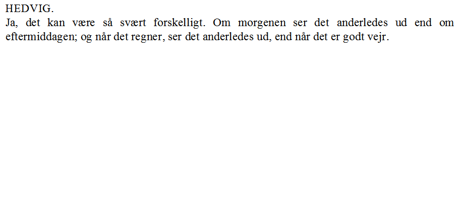 Døme på skrifttypen Times New Roman